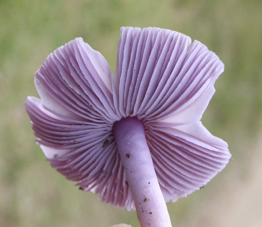 Humidicutis lewelliniae, showing splits dividing gills - Hazelbrook, Bleu Mtns NSW